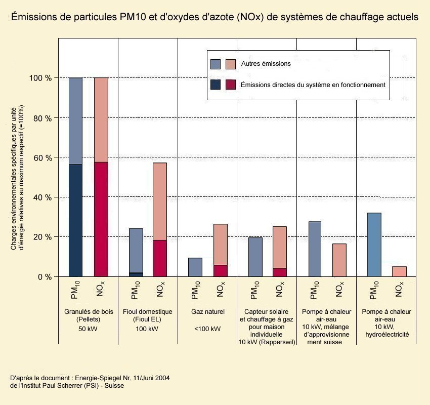 Profil écologique de systèmes de chauffage actuels en Suisse. Èmissions de particules PM10 et d'oxydes d'azote (NOx = NO + NO2).